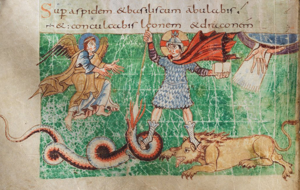 Stuttgarter Psalter (9. Jh.) fol 23. Württembergische Landesbibliothek. Illustration von Psalm 91:13 auf 107v, super aspidem et basiliscum ambulabis et conculcabis leonem et draconem